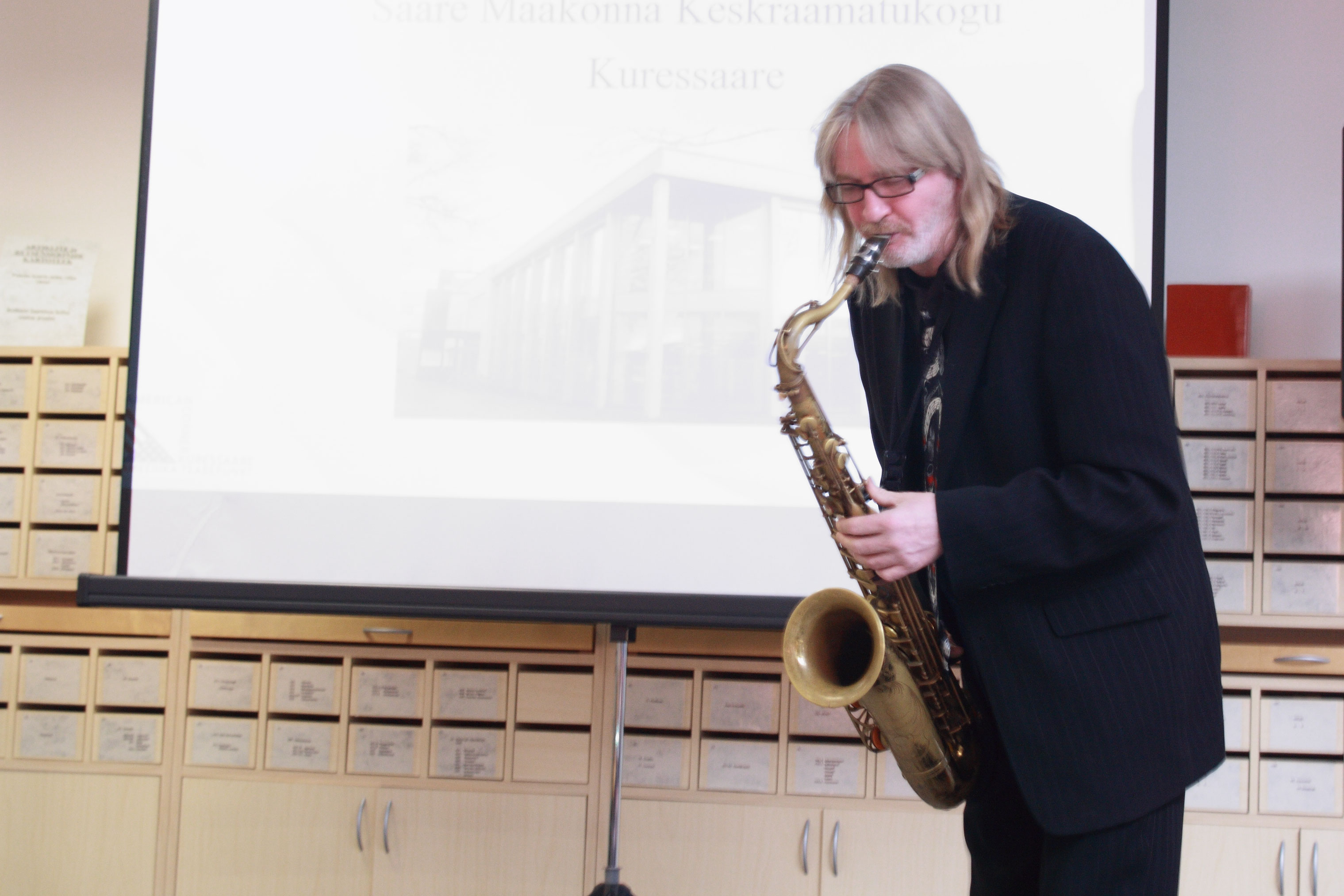 Villu Veski